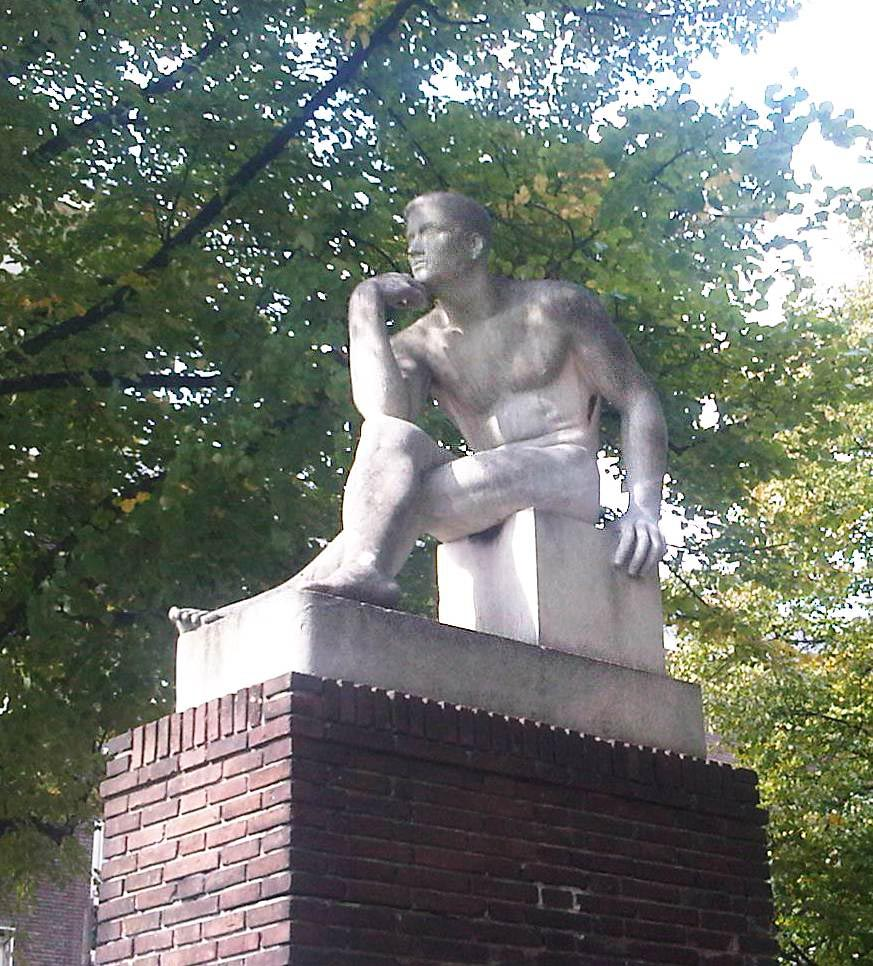 Beeld Minervalaan: De rustende atleet (Jan Havermans)